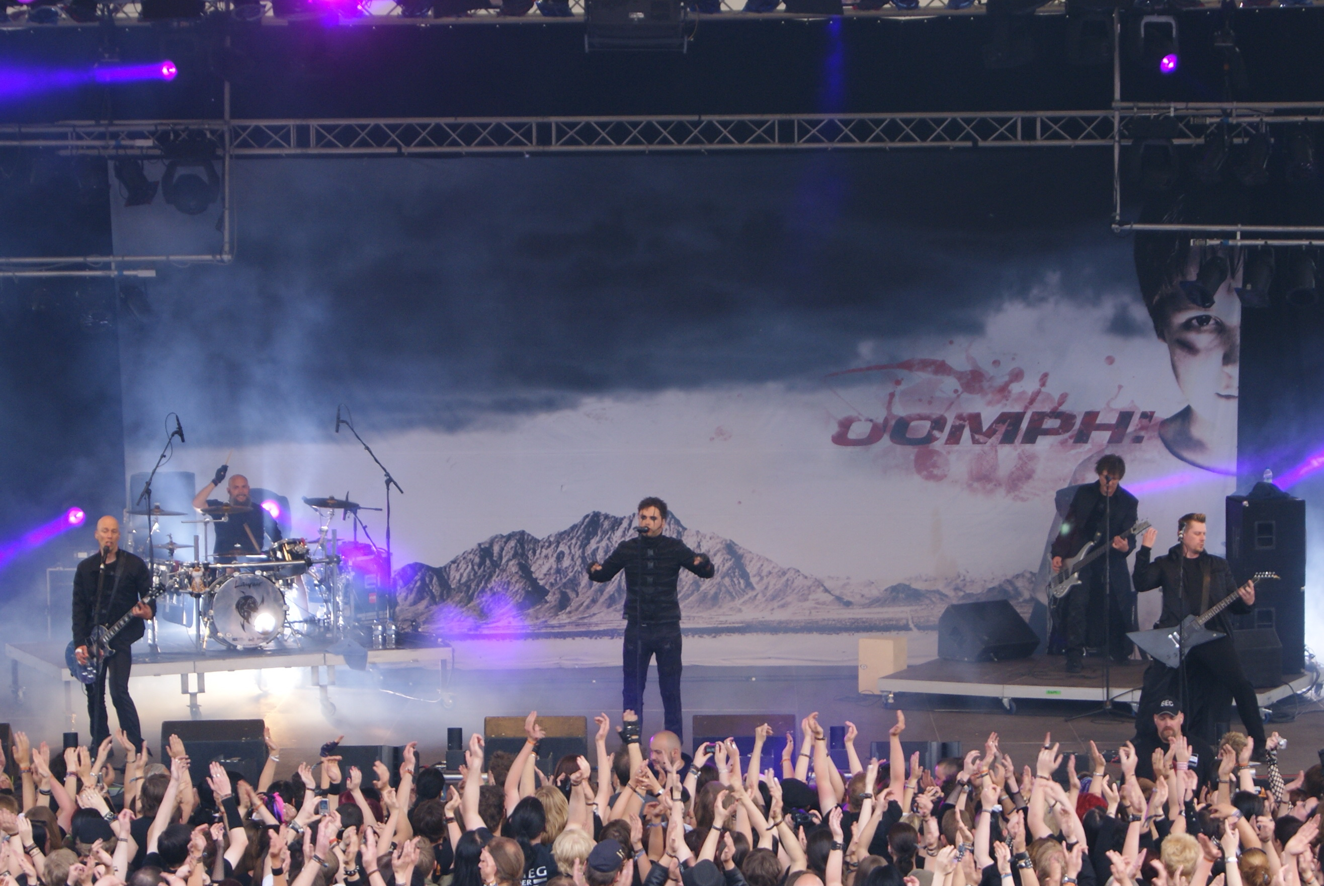 Oomph! auf dem Blackfield 2010